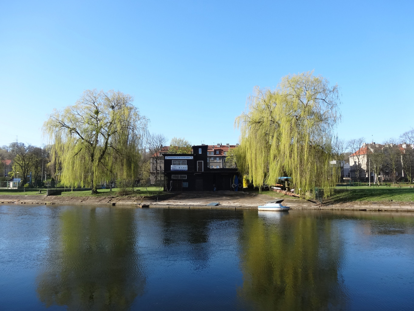 Przystań Bydgoskiego Klubu Wioślarek nad Brdą w Bydgoszczy